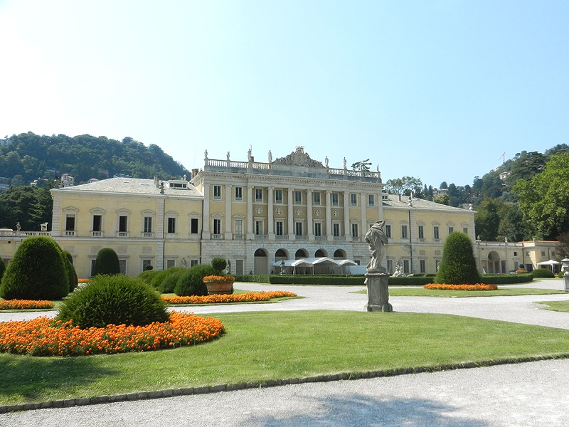 Como - Villa Olmo